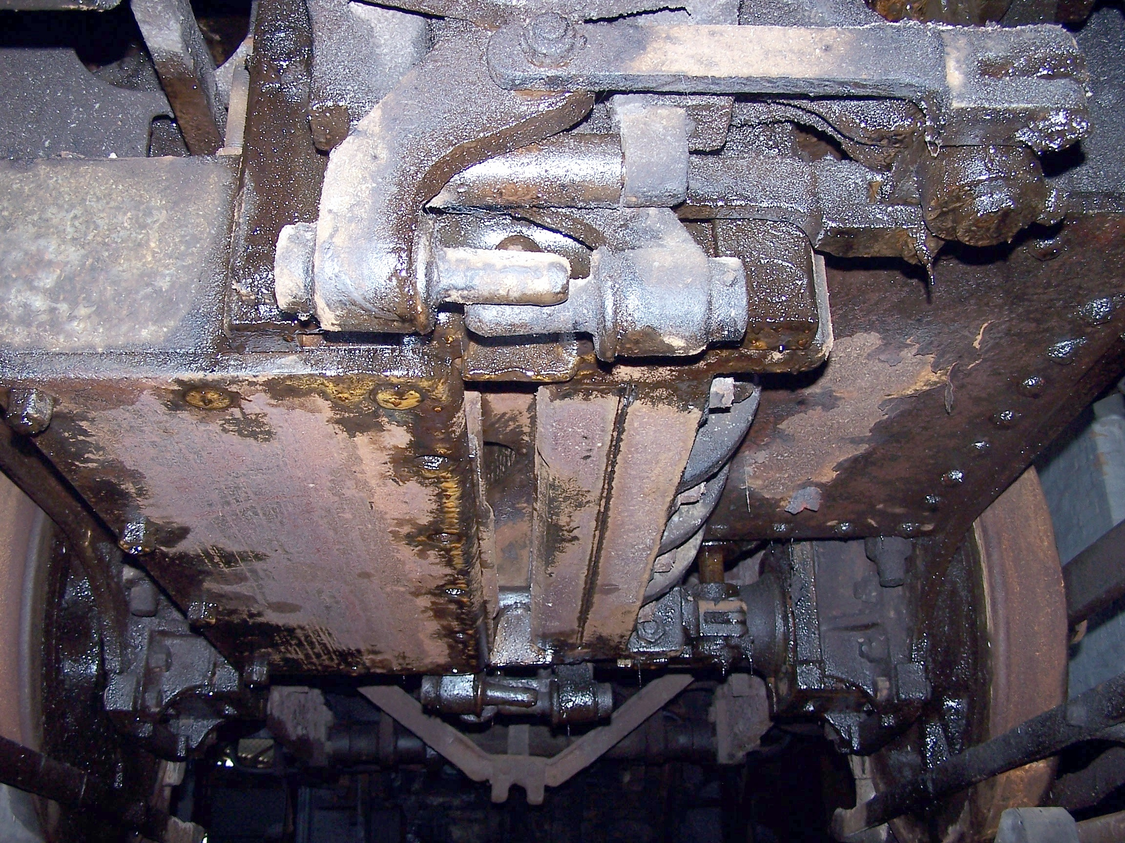 Paranapiacaba - Santo André - SP - Brasil. Locobreque no pátio do museu, detalhe do sistema de trava do cabo de aço. Foto de Paulo Carmona Sanches Neto - 2005